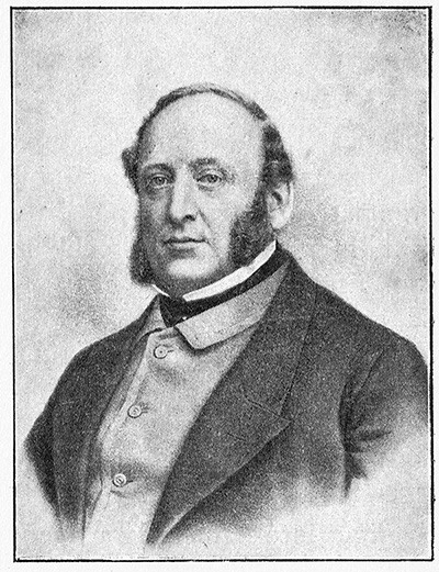 Knut Filip Bonde (1815-1871)